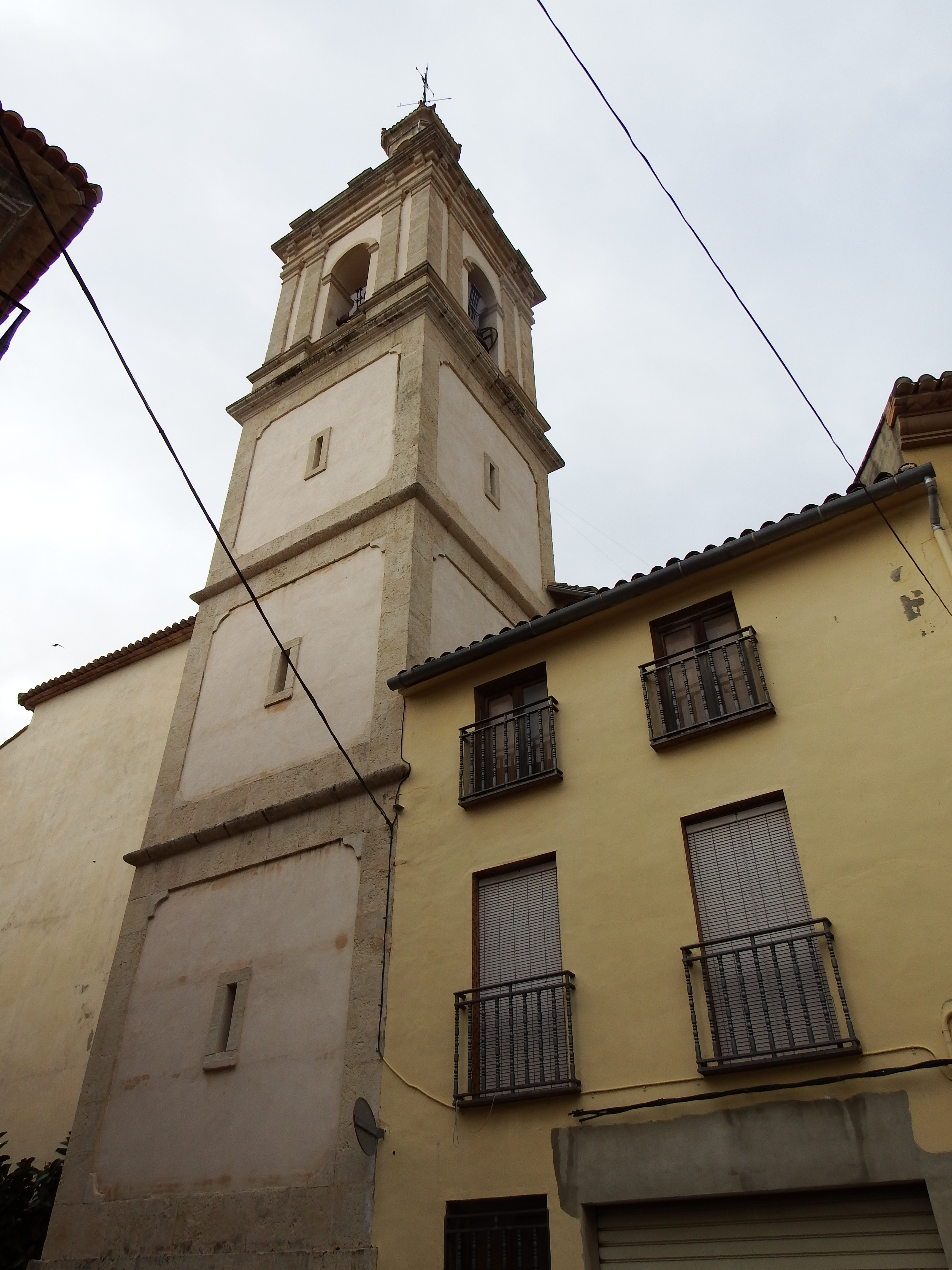 Imágenes de Anna, La Canal de Navarrés